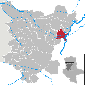 Wolmirstedt in Saxony-Anhalt (Country) - District (Landkreis) Börde